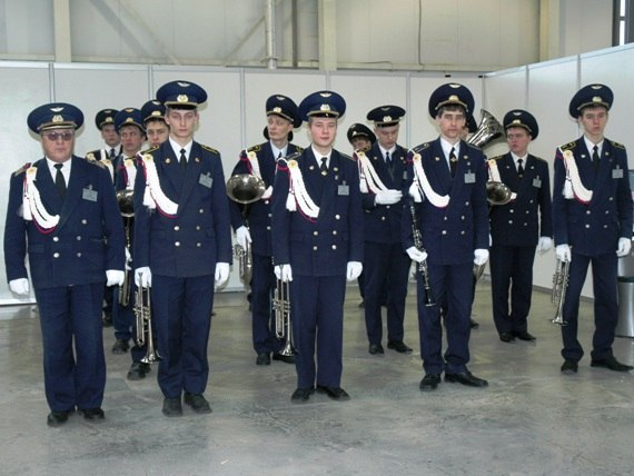 Оркестр колледжа